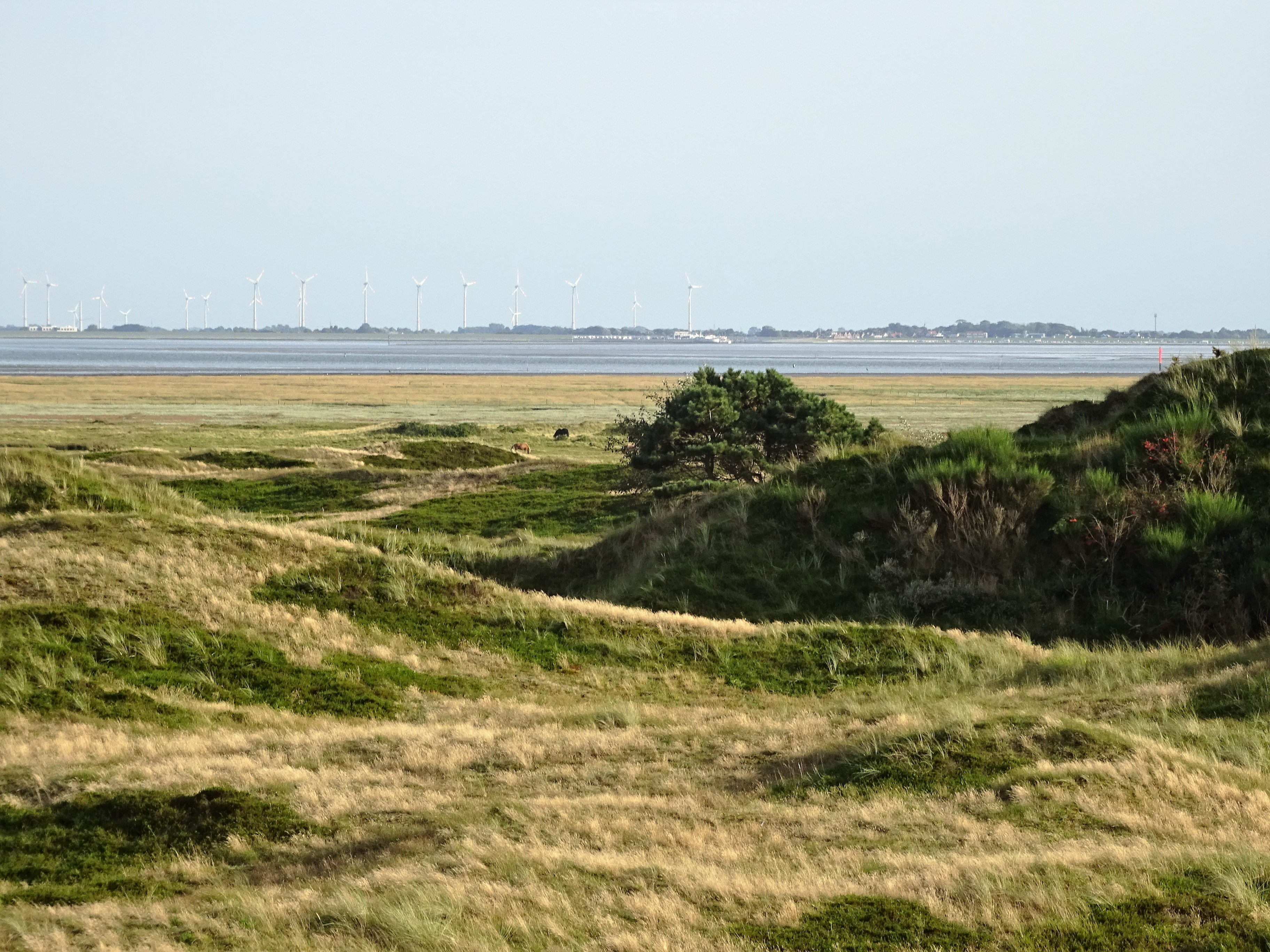 Nationalpark Niedersächsisches Wattenmeer - Damenpad Spiekeroog (11)